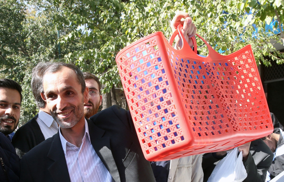 تۆرکجه: حمید بقایی